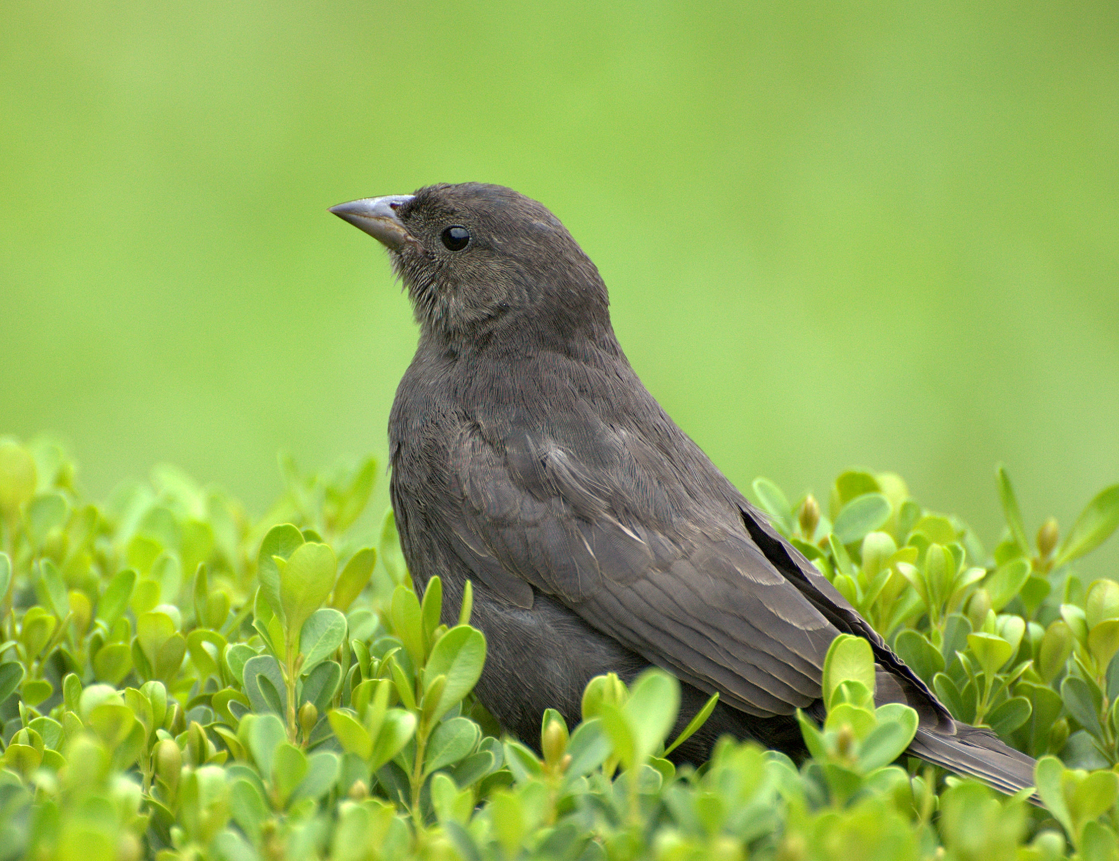 Parque da Independência, Museu do Ipiranga, São Paulo